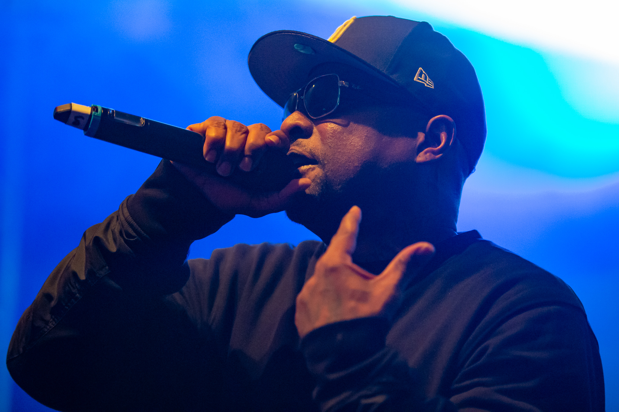 Concertbüro Franken,James Savage,Jayo Felony,Livekonzert,Livemusik,Löwensaal